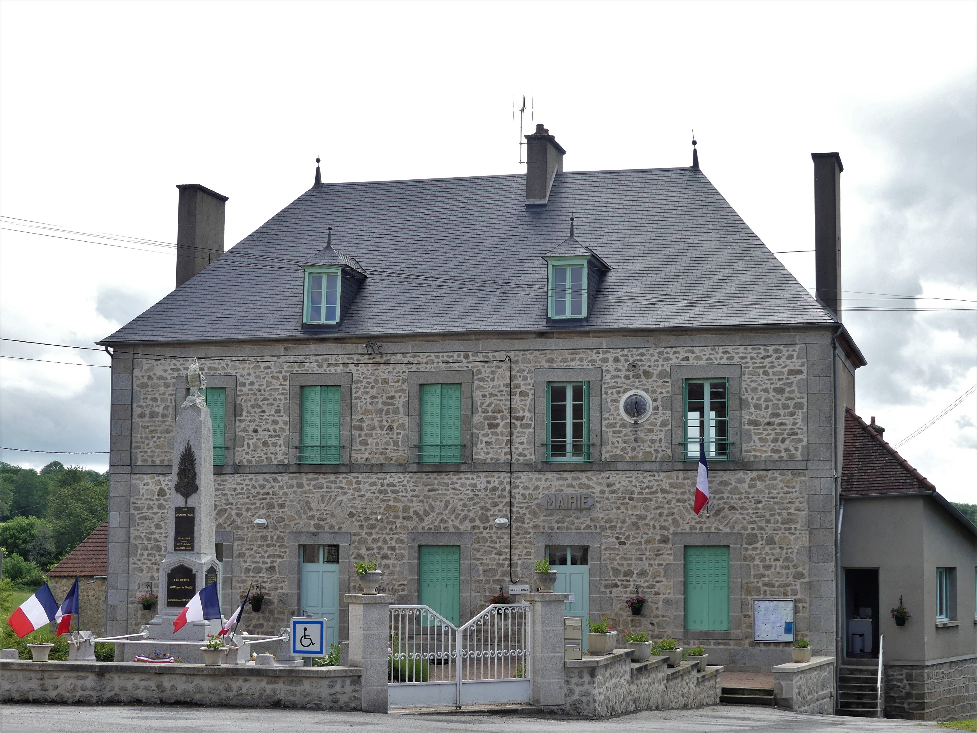 La mairie et le monument aux morts d'Issoudun-Létrieix, Creuse, France.